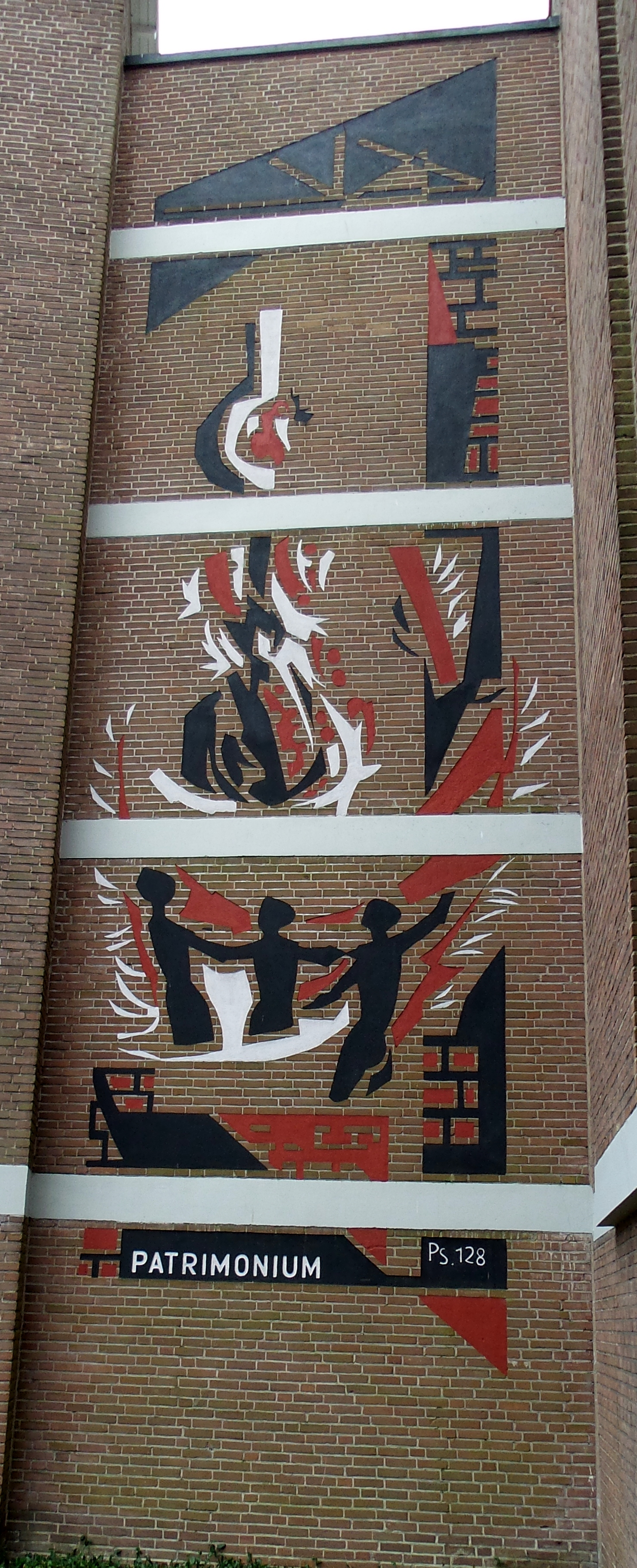 Figuren en Vuur van Berend Hendriks gevel van flats Blomwijckerpad / Groenpad Amsterdam Osdorp uit 1960